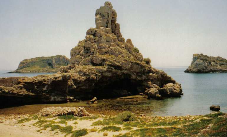 descrizione: Isola di Pianosa (LI) lavoro personale di Vinattieri Matteo (25/01/2007) che lascia in pubblico dominio